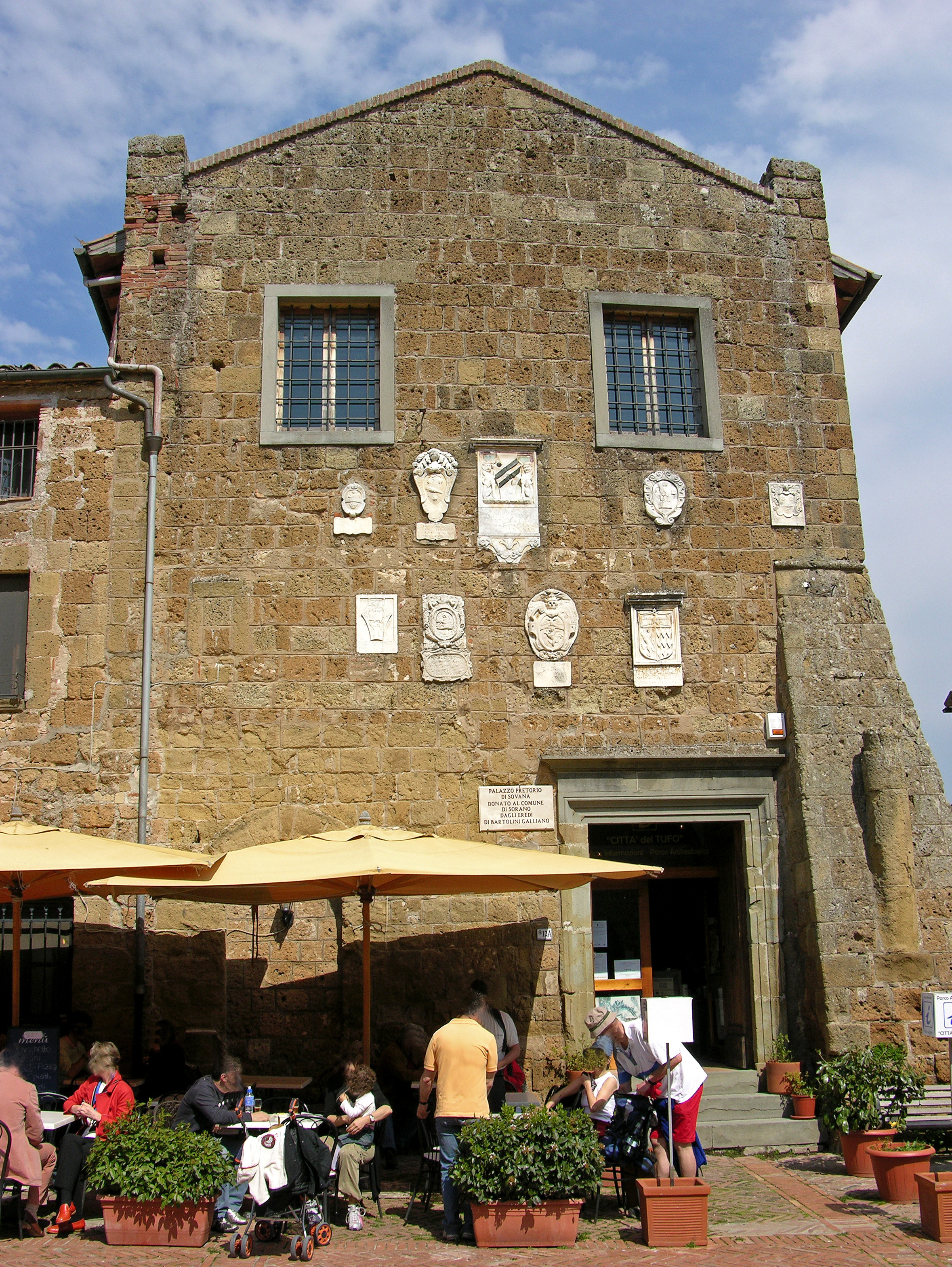 Palazzo Pretorio a Sovana (GR), Italy